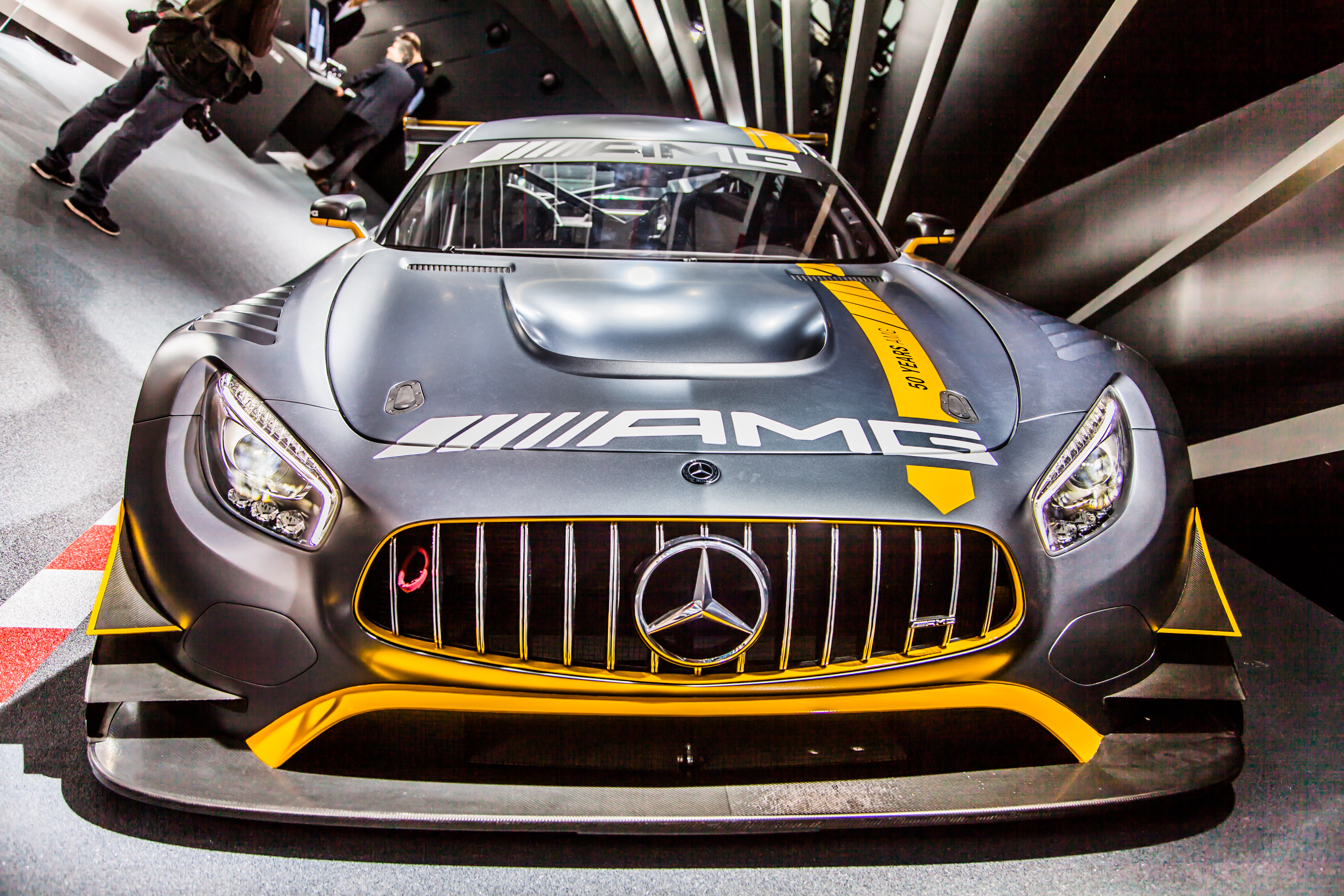 Mercedes-AMG GT3 auf der IAA 2017